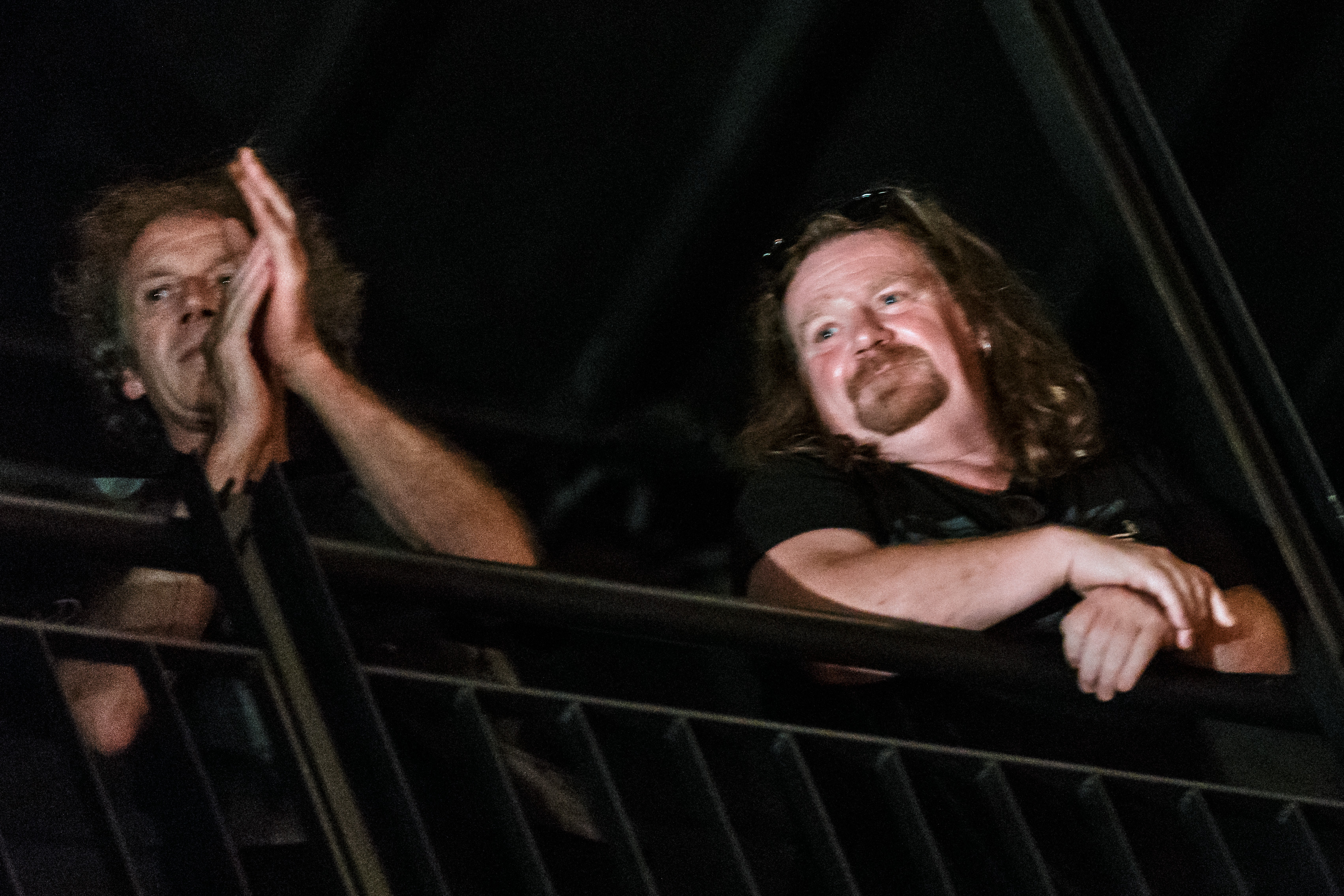 Alain Le Meur (Keltia) et le guitariste Pat O'May lors du concert d'Alan Stivell au théâtre de Cornouaille durant le Cornouaille Kemper le 22 juillet 2016.